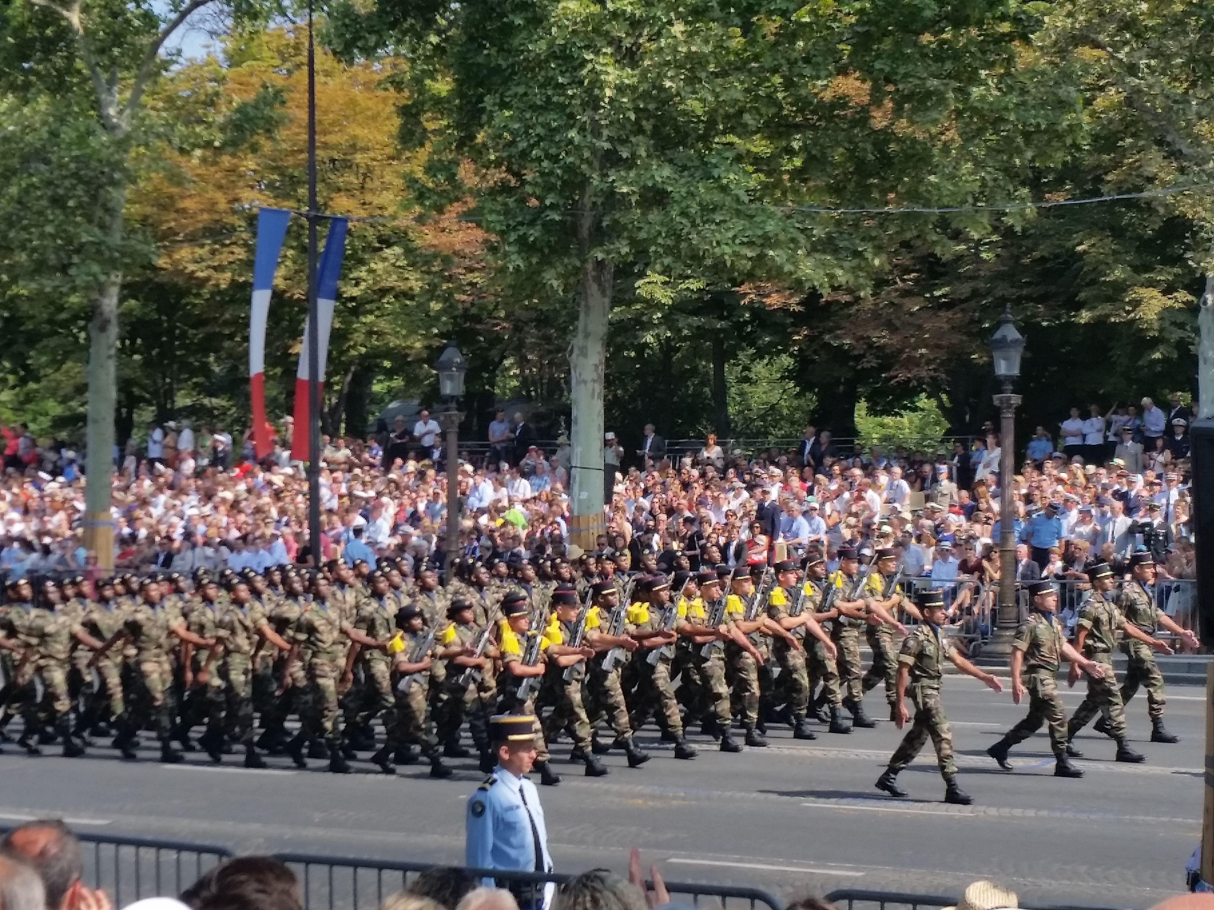 Le régiment du service militaire adapté de Mayotte défile le 14 juillet 2018 devant le Président de la République, à Paris, sous le commandement du Colonel Joël Bonte. Le RSMA est situé à Combani (Mayotte) et fait partie des FAZSOI.